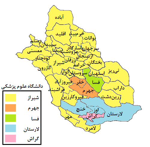 نقشه شهرستان‌های تابع دانشگاه‌ها و دانشکده‌های علوم پزشکی استان فارس منبع:وبسایت دانشگاه‌ها شیراز، جهرم، فسا، لارستان و گراش